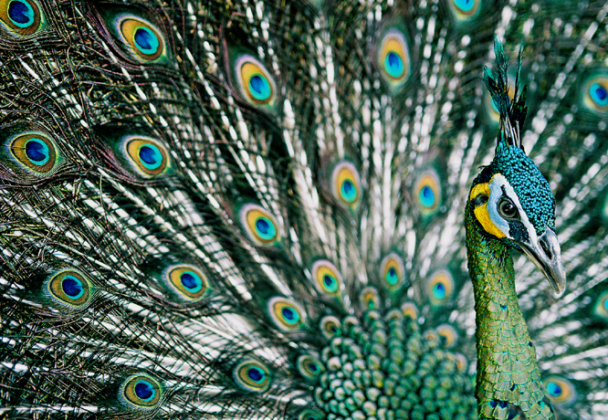 Discovered in Ho Chi Minh's garden in Hanoi, Vietnam